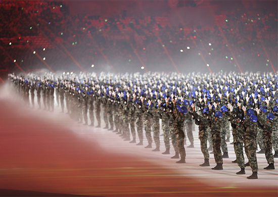 Сборная ВС РФ приняла участие в открытии Всемирных военных игр в Ухане